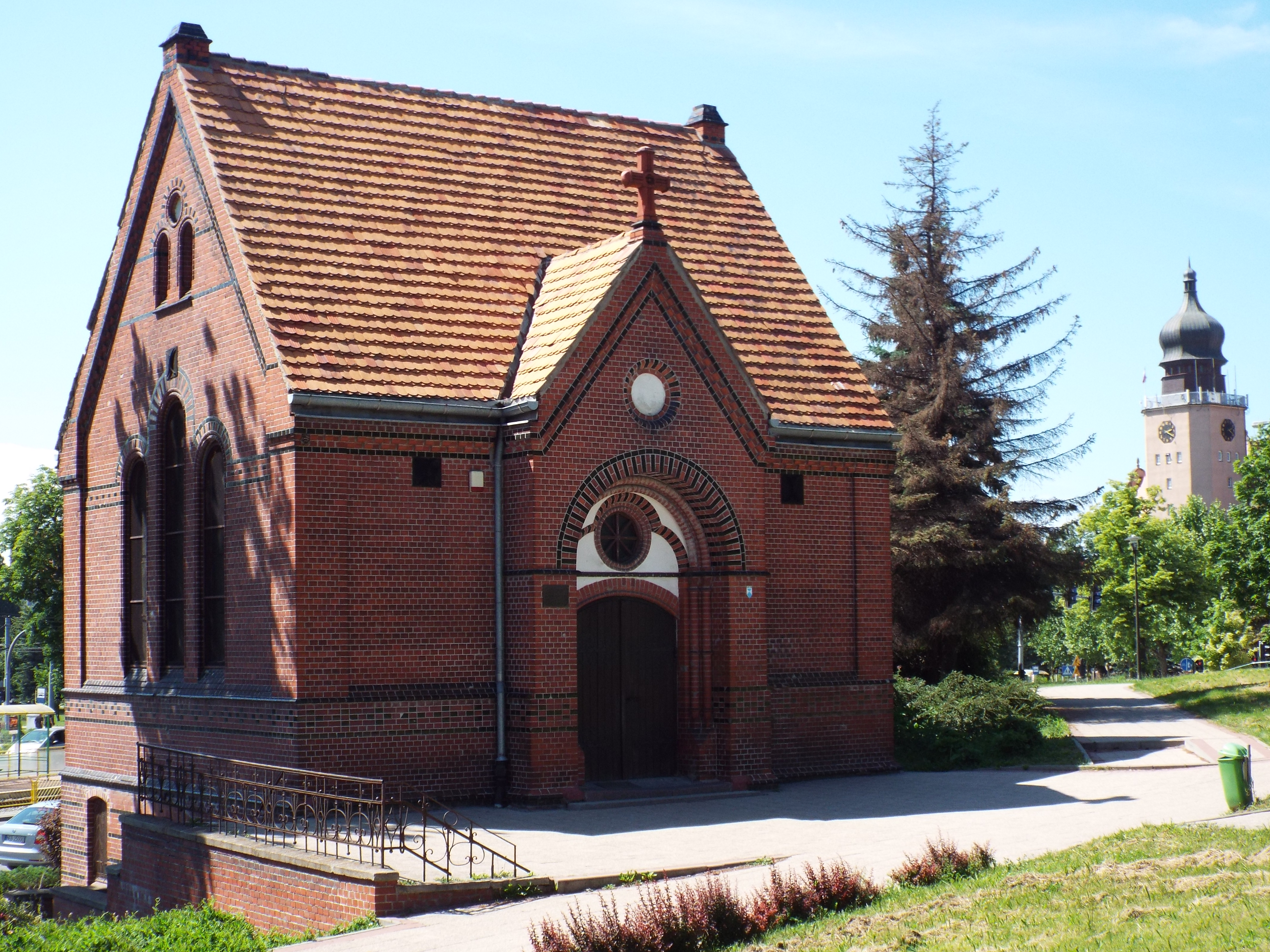 Elbląg, ul. Traugutta 15 - pierwotnie ewangelicka kaplica cmentarna p.w. św. Anny, obecnie cerkiew greckokatolicka św. Jana Chrzciciela, 1902